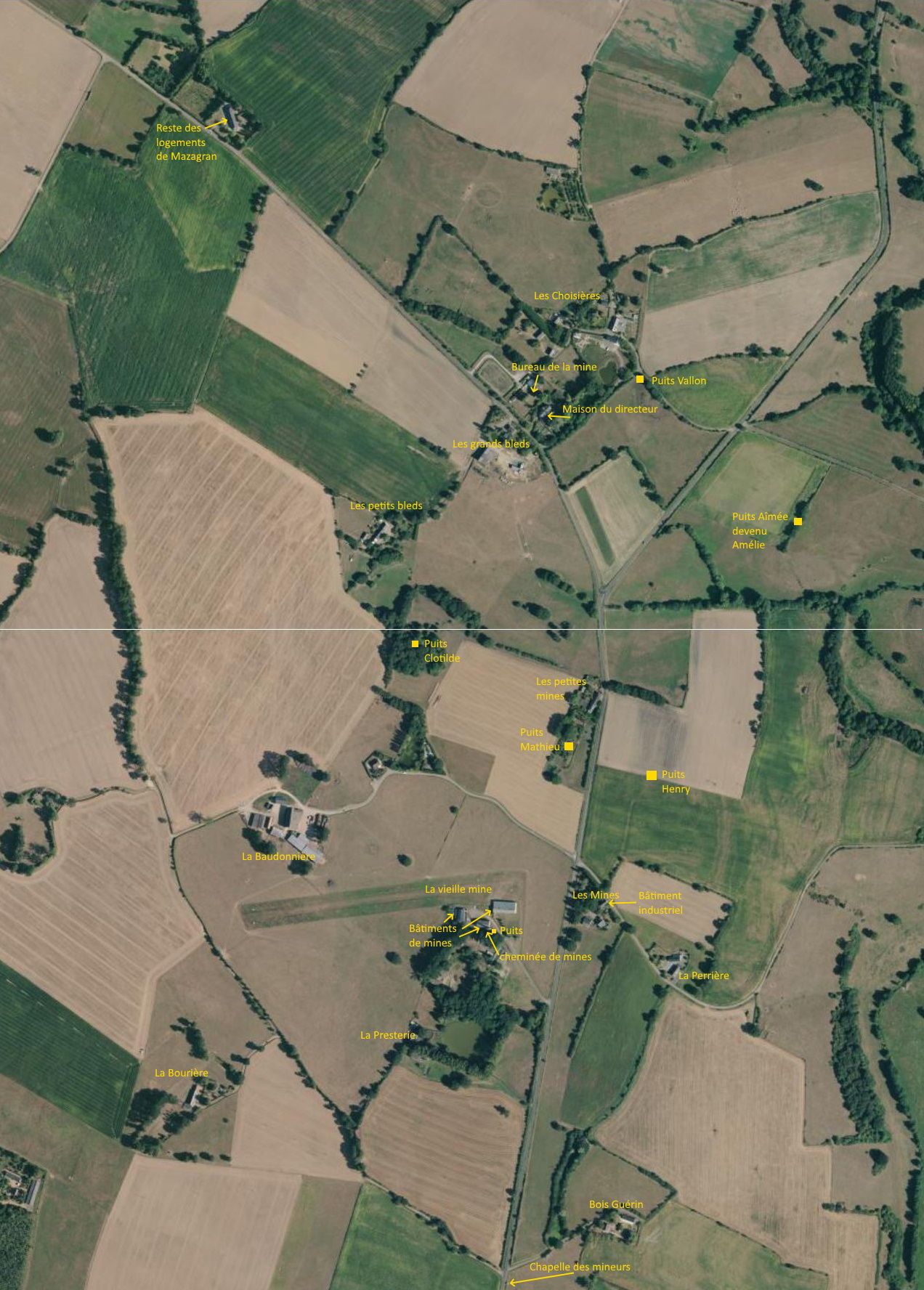 Les mines aujourdhui